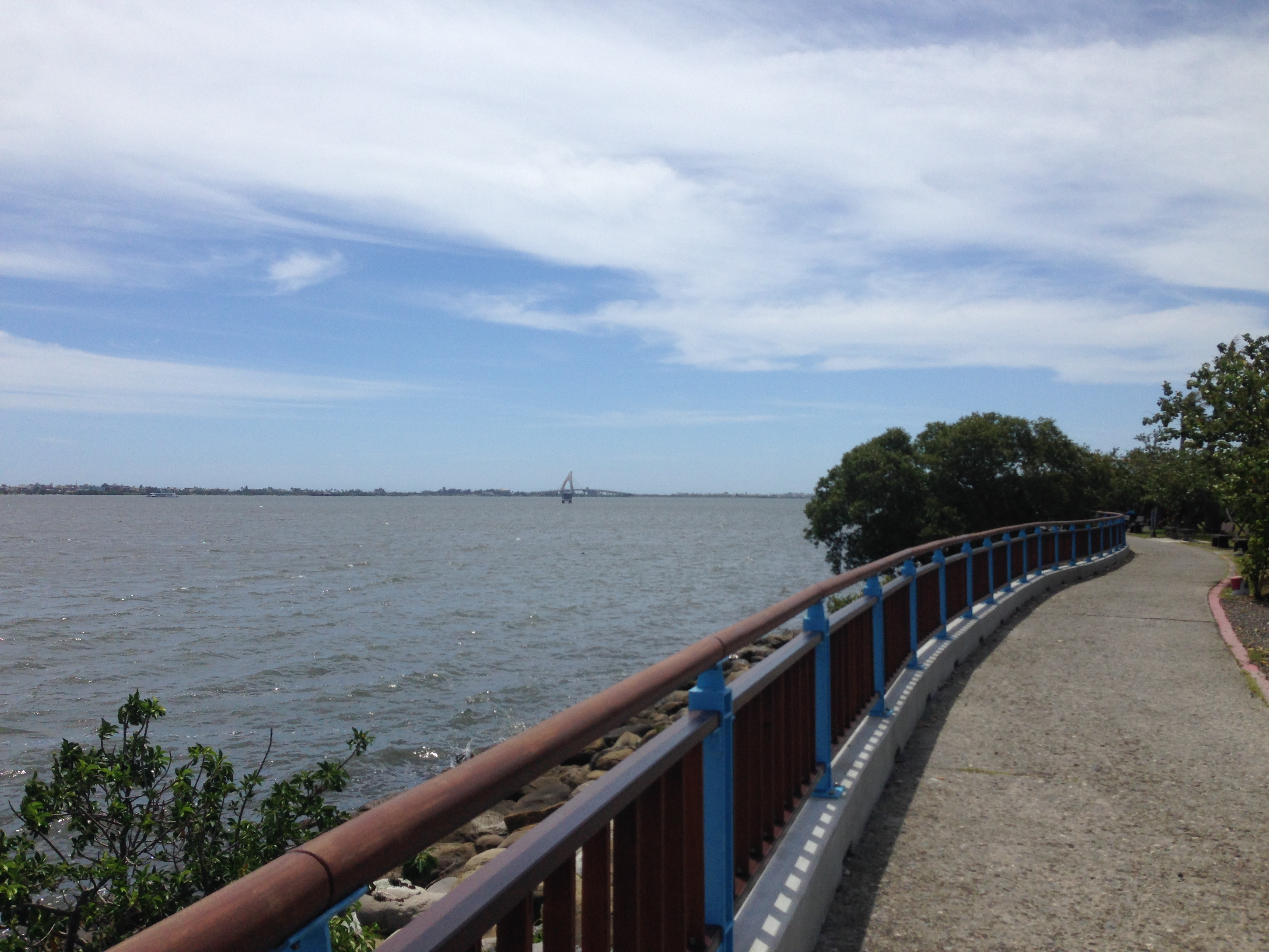 中文（台灣）: 大鵬灣環灣自行車道海景